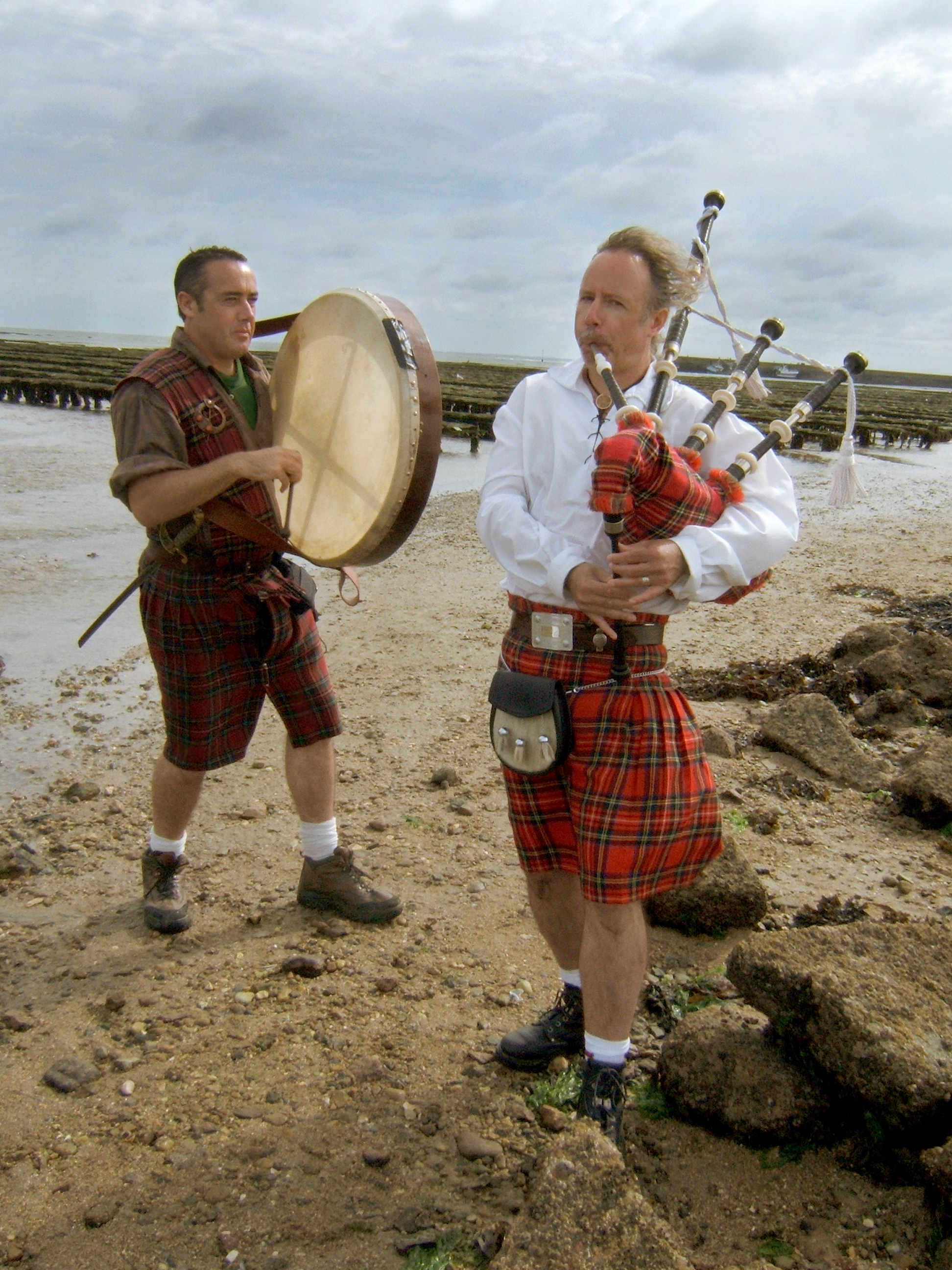 Un joueur de cornemuse (Eric DENTINGER) et un joueur de bodhrán (prononcez "bowrone") (Anthony WRIGHT) sur le chemin de Tatihou, entre les parcs à huitre, à Saint-Vaast-la-Hougue.